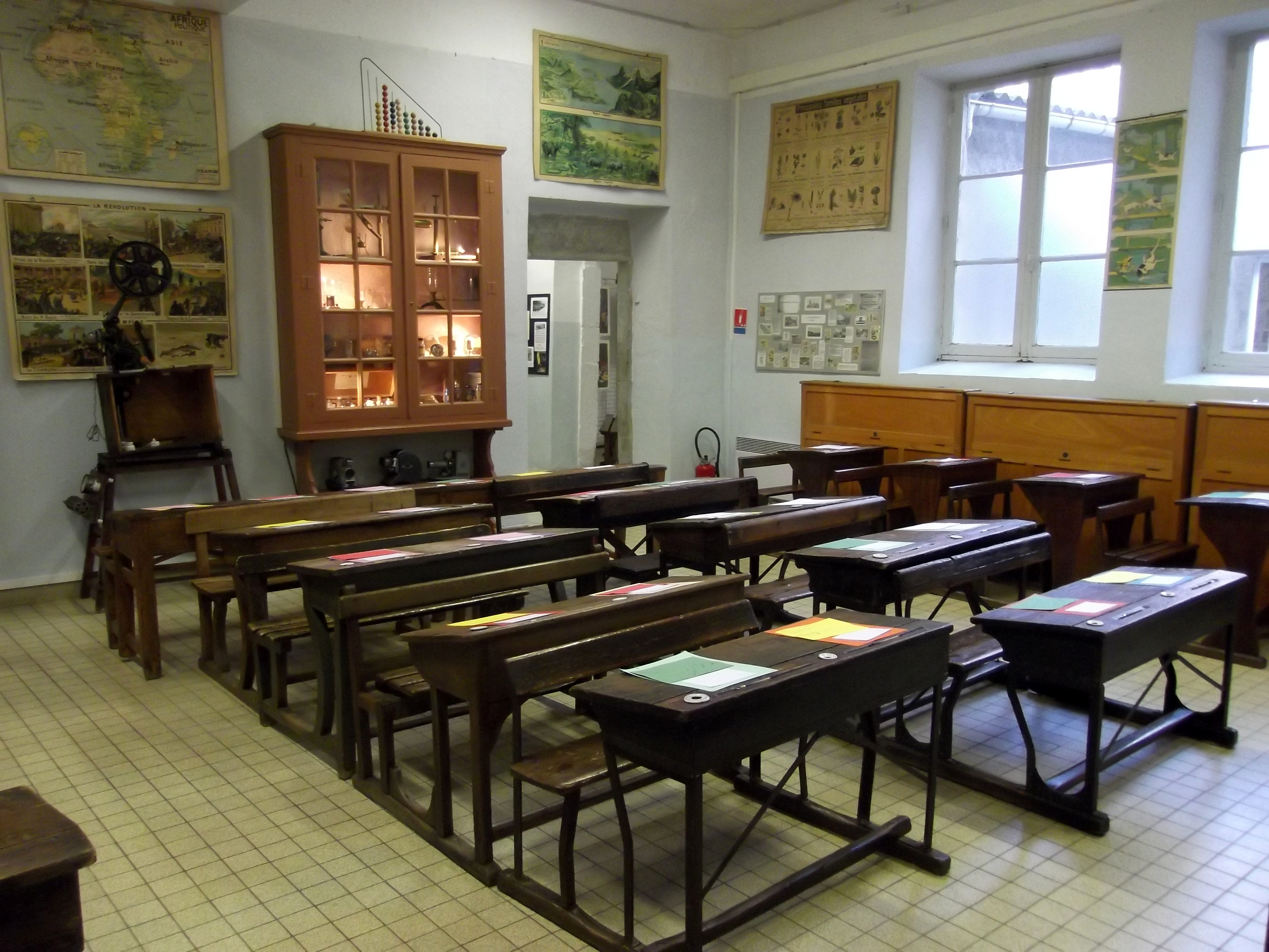 Une des salles du musée de l'école, situé, rue du plot, au cœur de la Cité de Carcassonne.